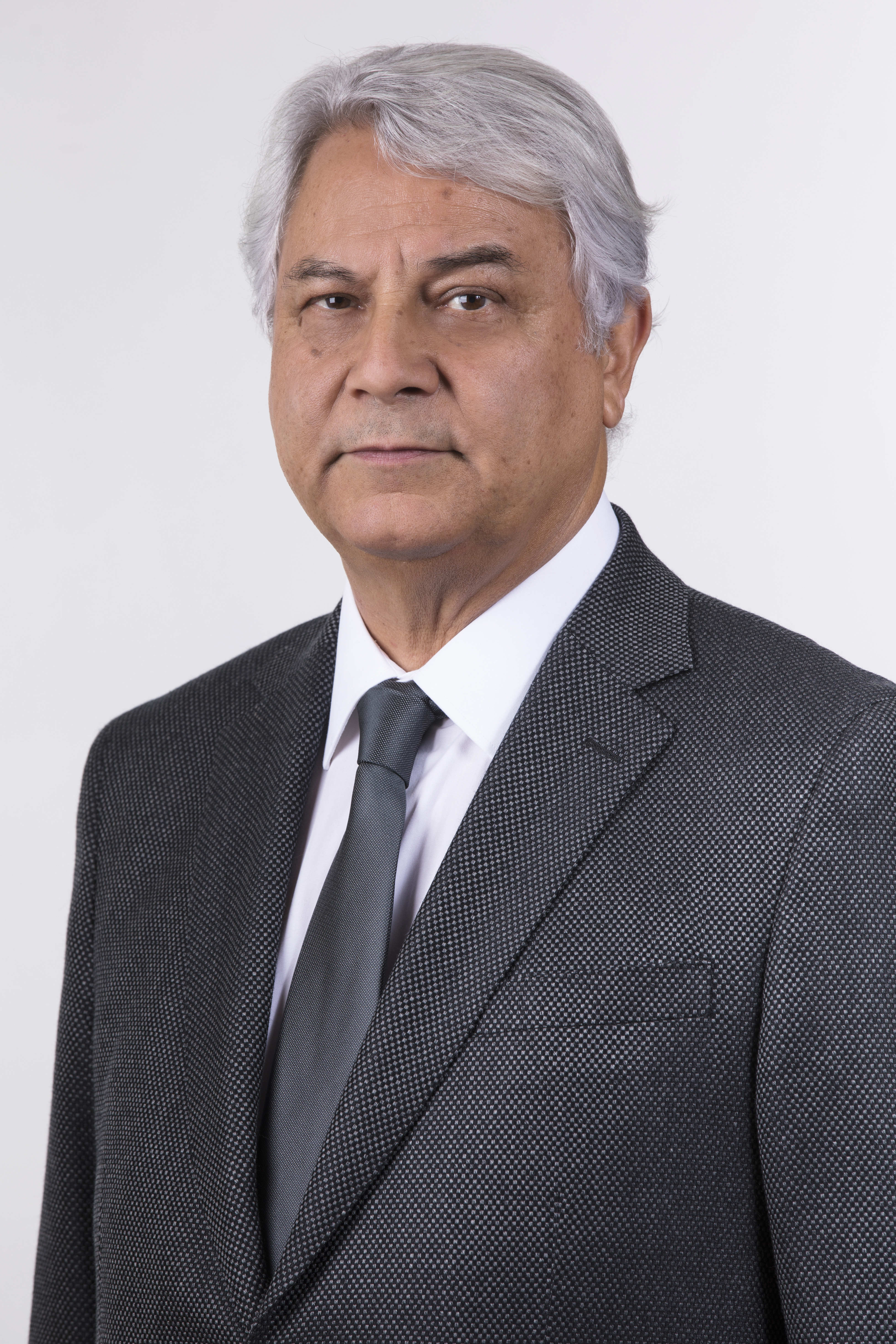 Jaime Naranjo Ortiz en la fotografía oficial de diputados periodo 2018-2022. (Fotos: Christel Andler, René Lescornez, Johanna Zárate)